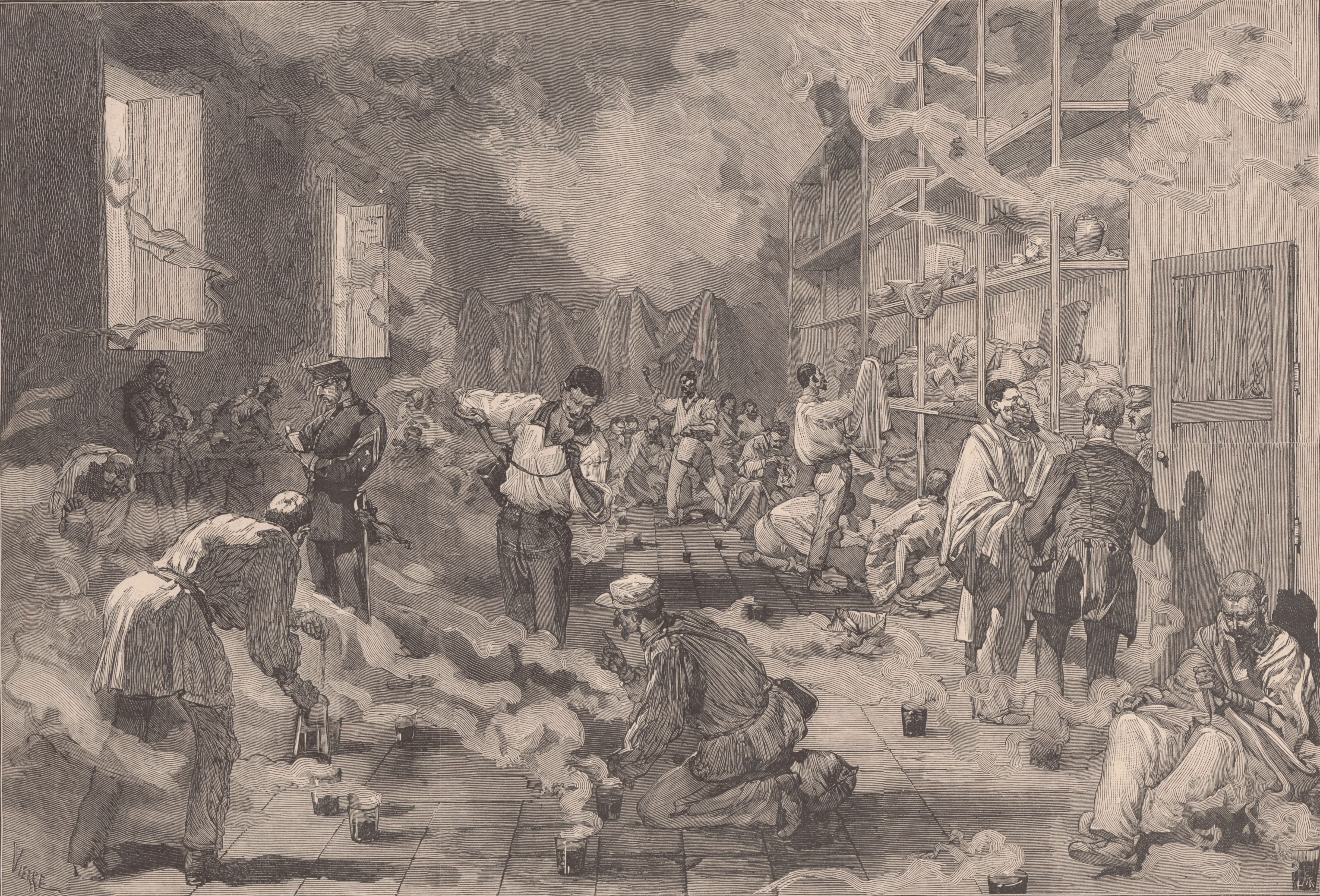 Leganés près Madrid. Précautions prises contre la fiévre jaune. Les fumigations qu'on fait subir à l'armée revenant de Cuba.